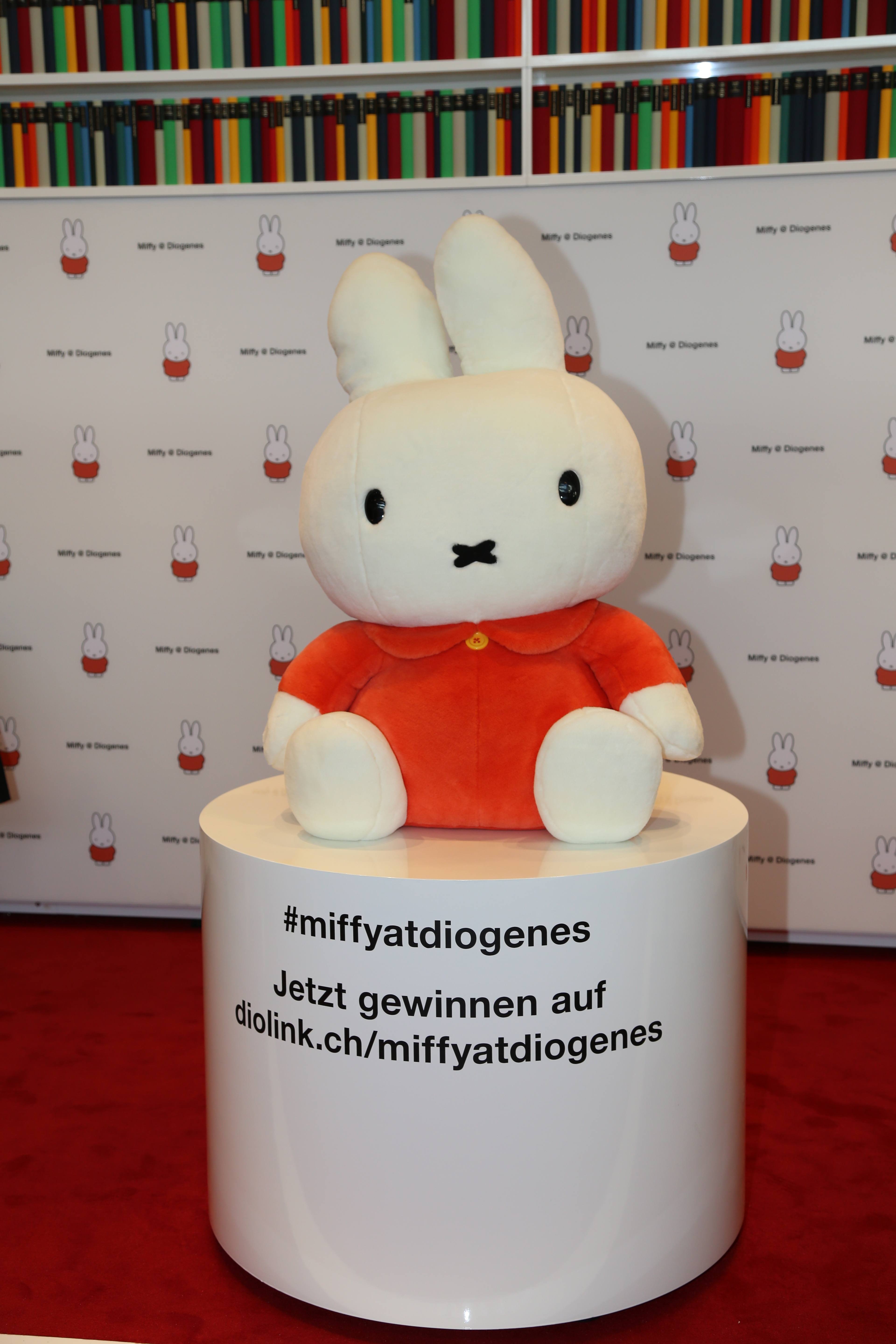 Miffy bei der Frankfurter Buchmesse 2016